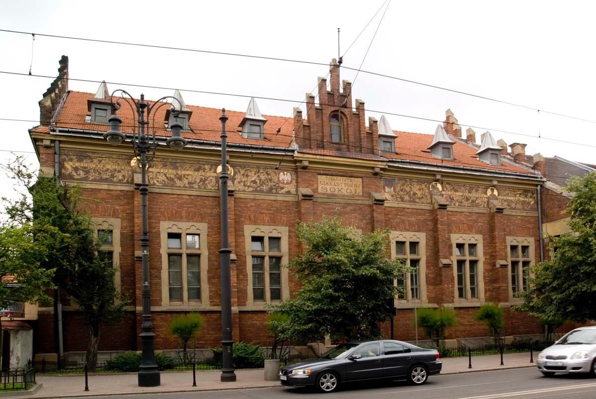 Widok z boku budynku "Sokoła".